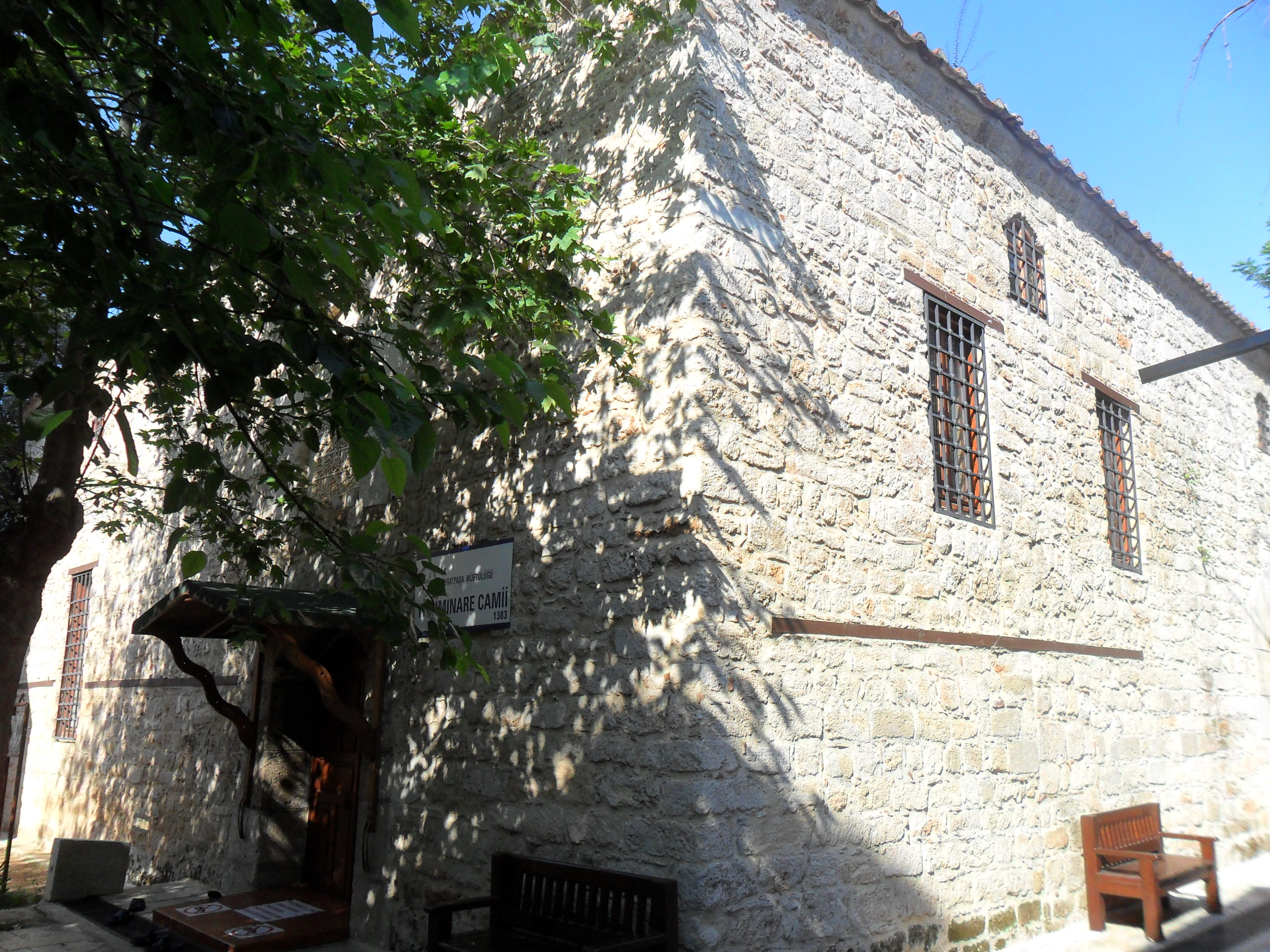 Yivli Minare Camii'den bir görünüm.